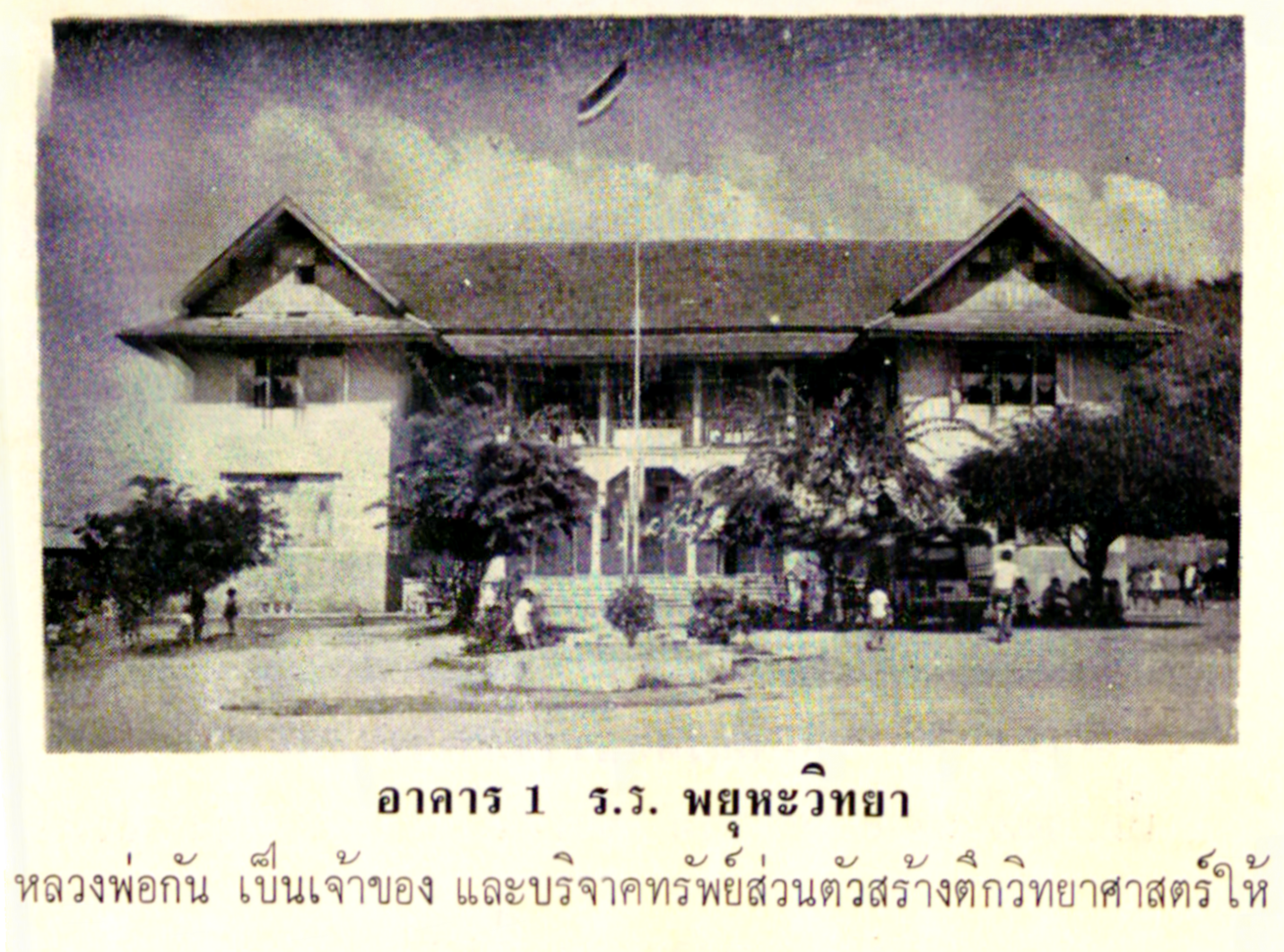 ตึกเรียนแห่งแรกของโรงเรียนพยุหะวิทยา (วัดเขาแก้ว)